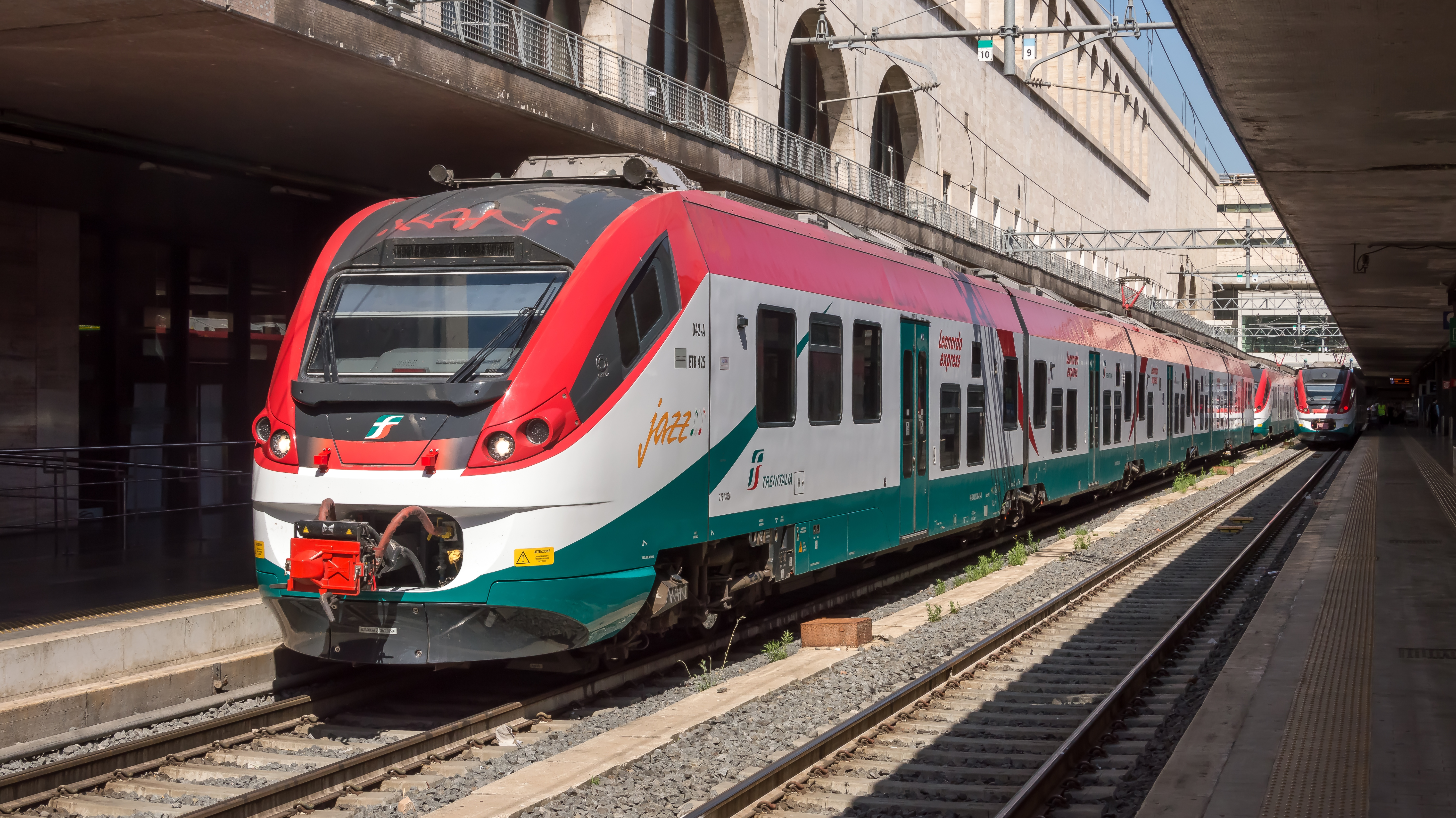 Rome Termini Trenitalia Leonardo Express ETR 425 042. Deze echt in Italiaanse kleuren getinte treinen verzorgen het vervoer tussen Rome en het Leonardi da Vinci vliegveld, buiten de stad. Italiaanser kan bijna niet.